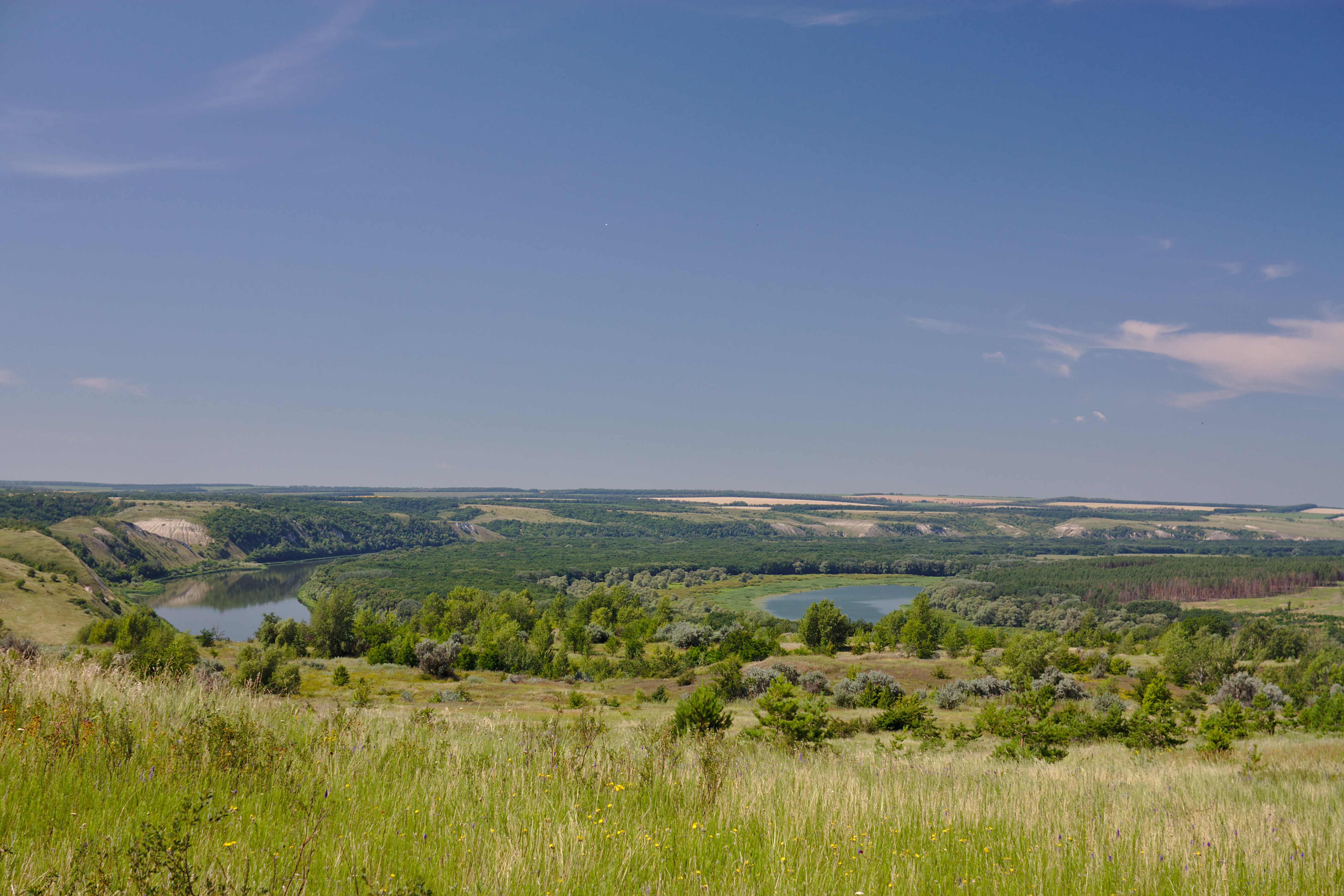 Верхнемамонский затон: 1069 км р. Дон, в 9 км южнее с. Верхний Мамон. Верхнемамонское сельское поселение, Верхнемамонский район, Воронежская область This image is related to the protected area of Russia number 3610263